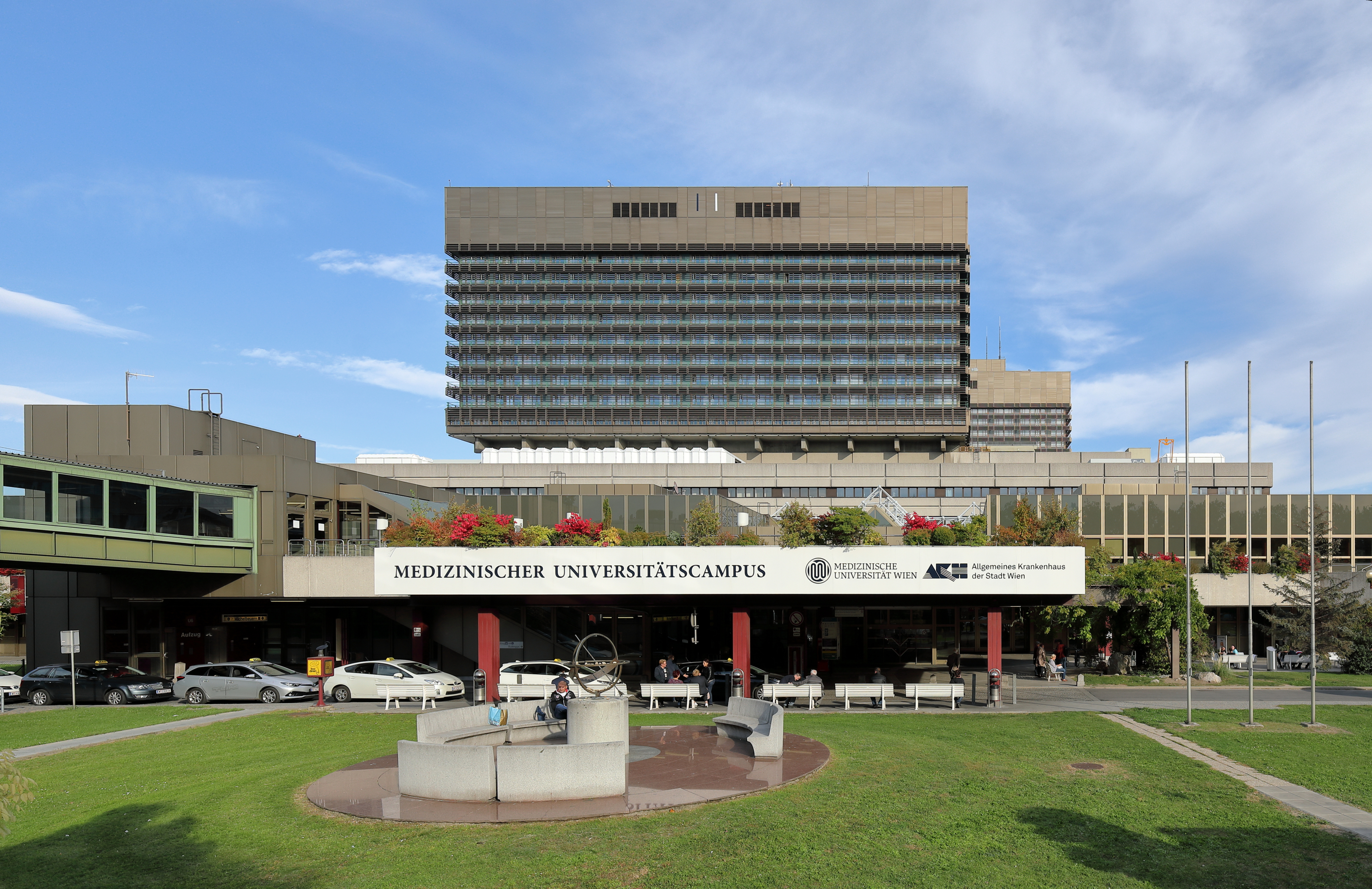 Hauptportal des Allgemeinen Krankenhauses der Stadt Wien (AKH) an der Adresse Währinger Gürtel 18-20 im 9. Wiener Bezirk Alsergrund.Das AKH wurde auf einer Fläche von rund 345.000 Quadratmetern ab 1964 nach Plänen der Architekten Wolfgang Bauer, Felix Kässens, Georg Köhler, Hannes Lintl, Georg Lippert, Alexander Marchart, Otto Mayr, Roland Moebius und Otto Nobis errichtet. Am 31. Jänner 1991 begann die Besiedlung des Zentralbaus des neuen Gebäudes und am 7. Juni 1994 erfolgte die offizielle Eröffnung.